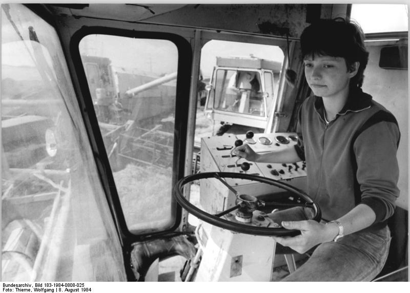 LPG Pflanzenproduktion Neukirchen, Agrotechnikerin ADN-ZB Thieme 8.8.84 Bez. Karl-Marx-Stadt: Ernte-Die 21jährige Agrotechnikerin Jenny Sickert fährt bereits das vierte Jahr in der Erntezeit einen Mähdrescher "E 512". Sie gehört zum Jugenderntekomplex der LPG Pflanzenproduktion Neukirchen. Die Werktätigen haben sich verpflichtet, mit Bestleistungen zum Weltfriedenstag beizutragen. (siehe auch 26 N)